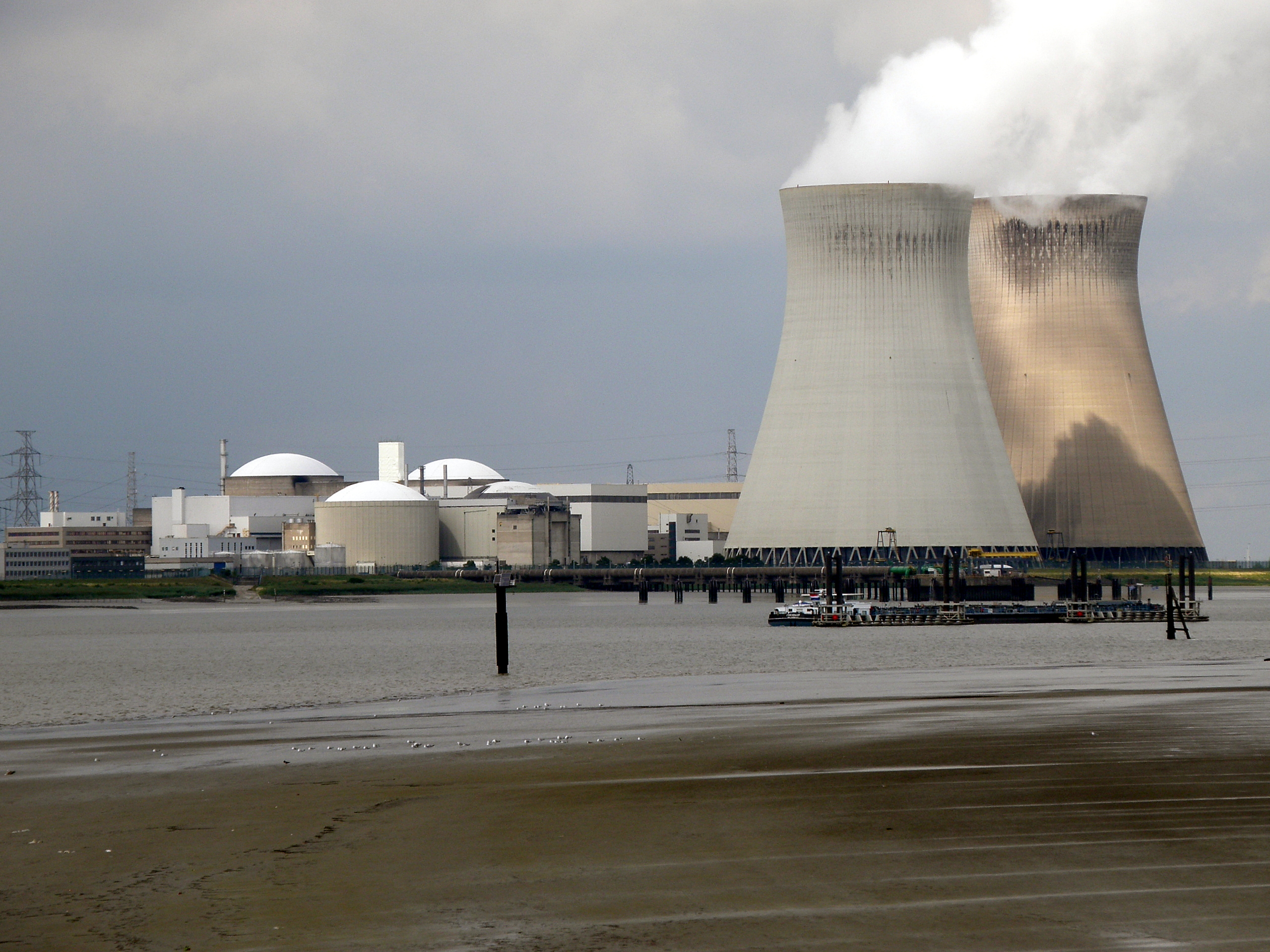 Doel (prov. de Flandre-Orientale, Belgique). Centrale nucléaire vue depuis Lillo sur la rive opposée de l'Escaut.